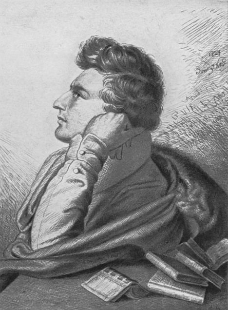 Heinrich Heine.